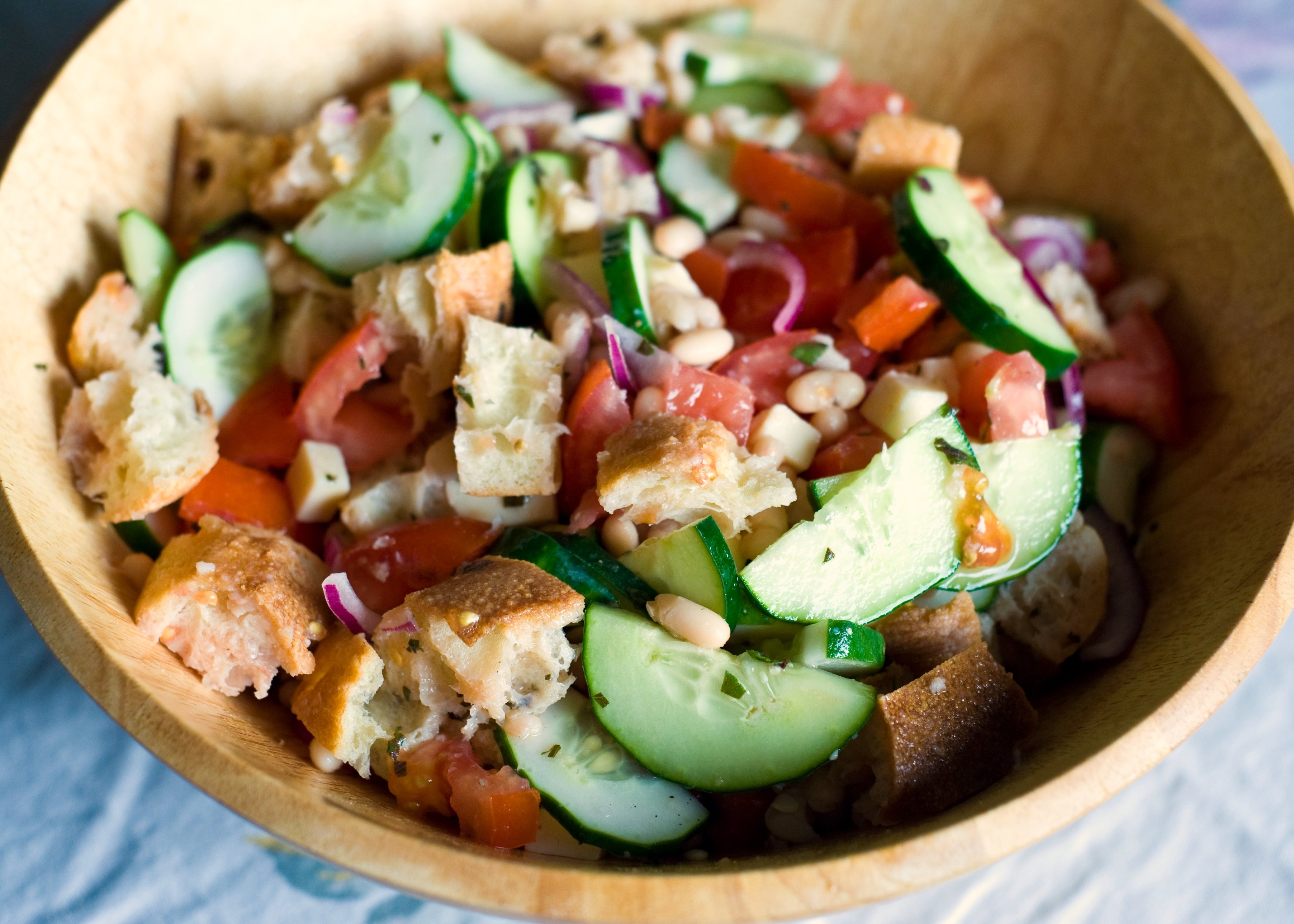 Italian Panzanella tonight's no cook summer dinner